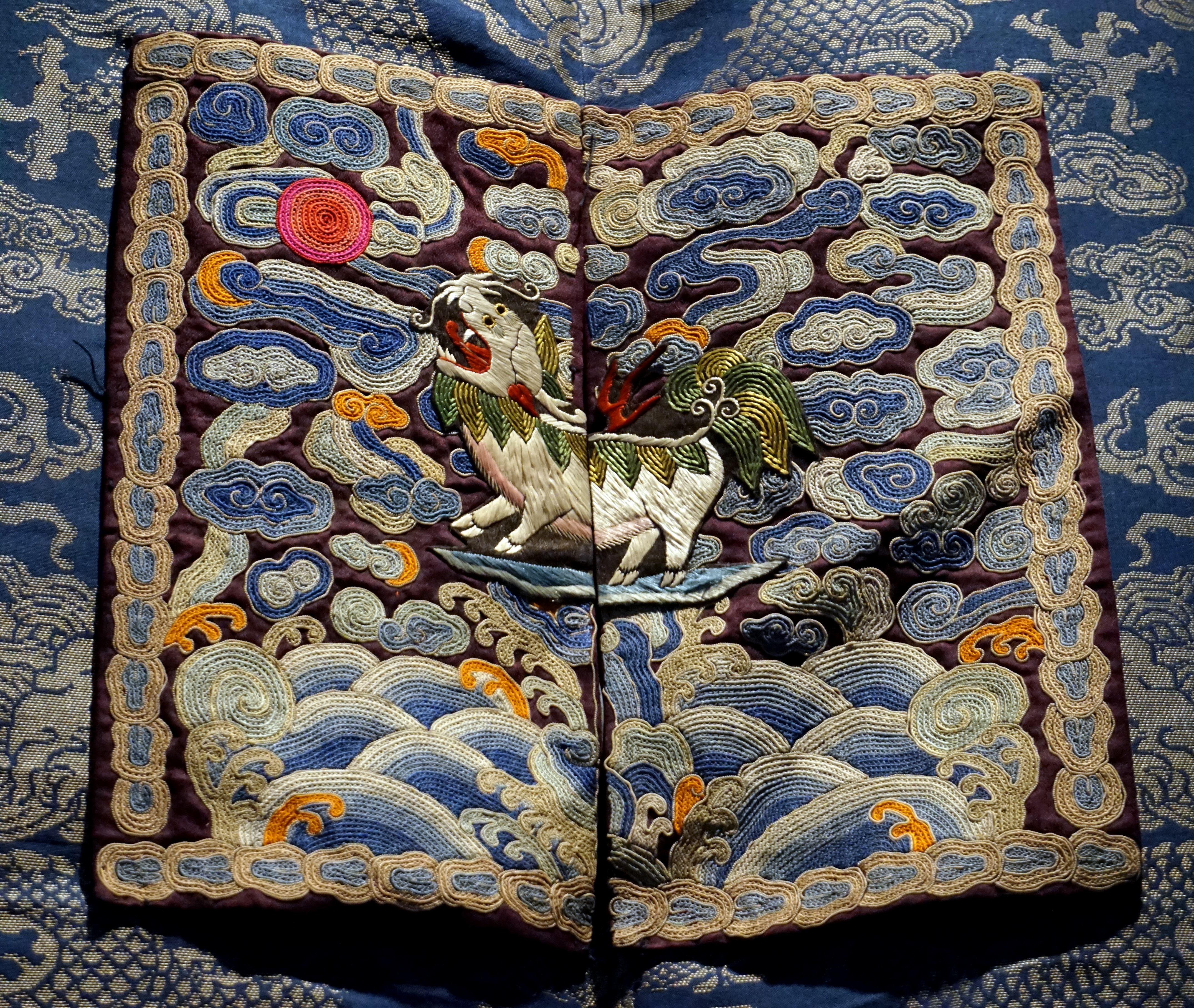 清徐定超御史蟒袍补子，上绣獬豸以示公正。温州博物馆藏。